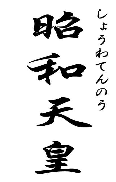 Calligraphie de "Shôwa Tennô"